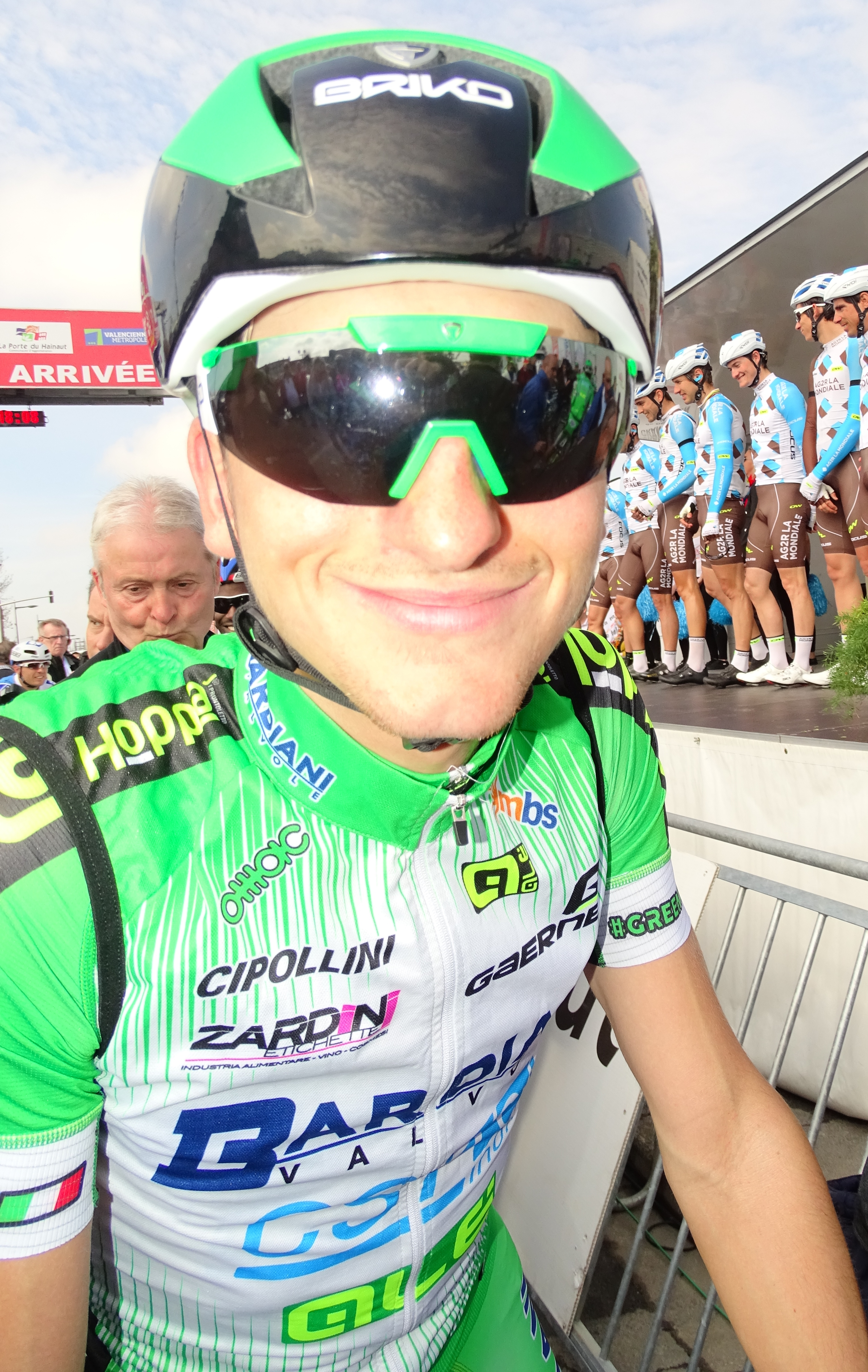 Reportage réalisé le jeudi 14 avril à l'occasion du départ et de l'arrivée du Grand Prix de Denain 2016 à Denain, Nord, Nord-Pas-de-Calais-Picardie, France.